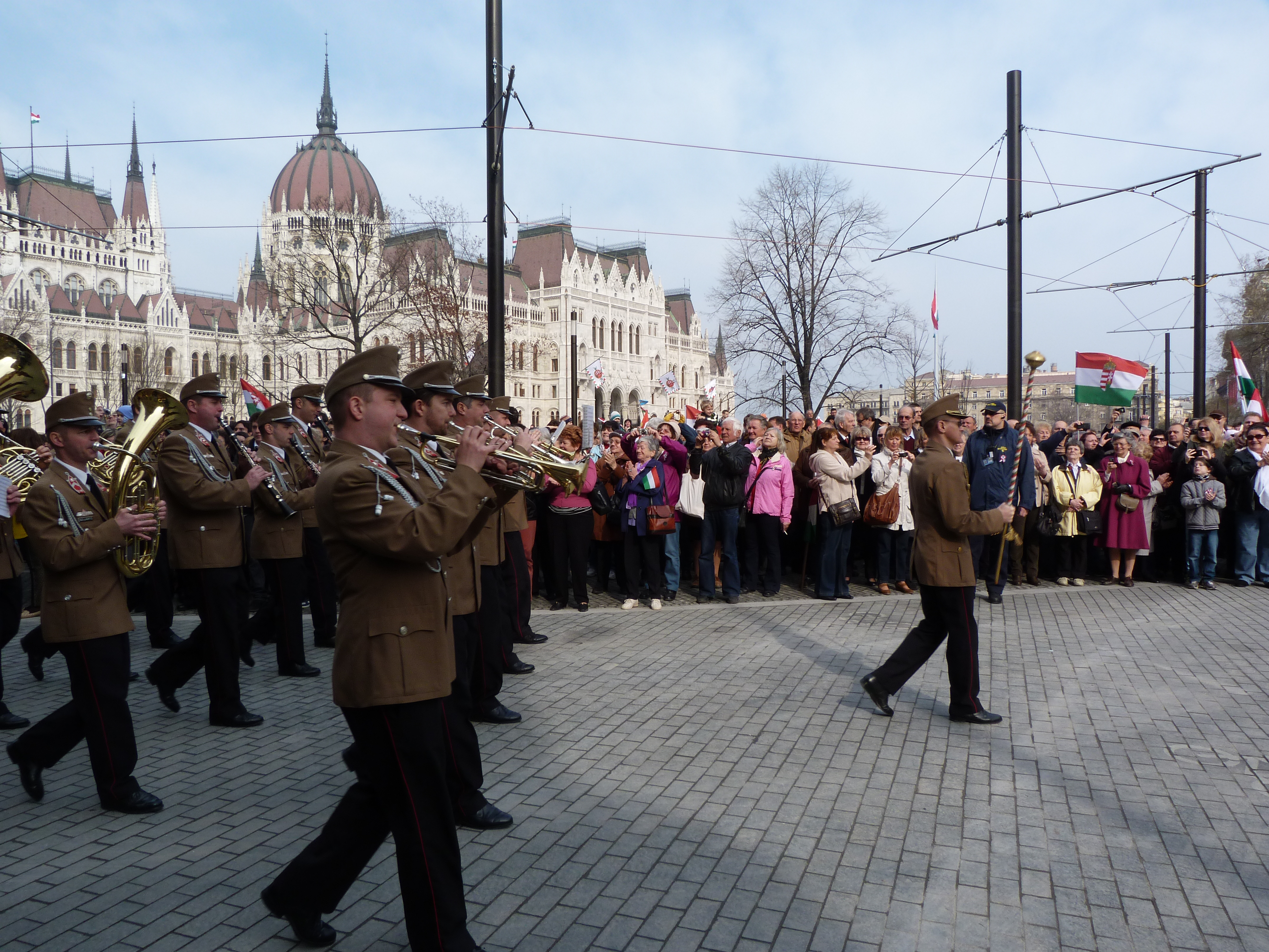 A felvétel 2014. március 15 -én készült Budapesten, a Kossuth téren. A katonazenekar felvonulása. ©© Derzsi Elekes Andor, Budapest, 2014, A kép és filmfelvételek egészben, vagy részletekben másolását, bármilyen úton történő sokszorosítását és felhasználását a szerző ellenérték nélkül, jogutódjaira is kihatóan megengedi. Az engedély kiterjed a kereskedelmi célú hasznosításra is. Kéri azonban nevének feltüntetését a felhasználás során. A Metapolisz sorozat valamennyi képe és filmje Creative Commons alatti valamint kereskedelmi - for profit - célra is felhasználható. Ajánlott hivatkozás: Derzsi Elekes Andor: Metapolisz DVD line